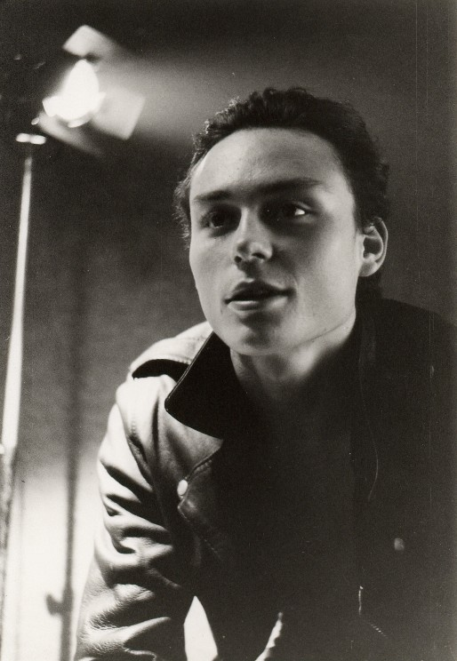 Photographie officielle du réalisateur Frédéric Forestier prise en 1987 par Frank Forrester au Studio Gusz